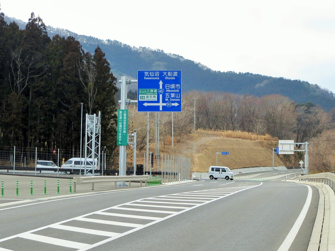 釜石南インターチェンジ Canon IXY 3